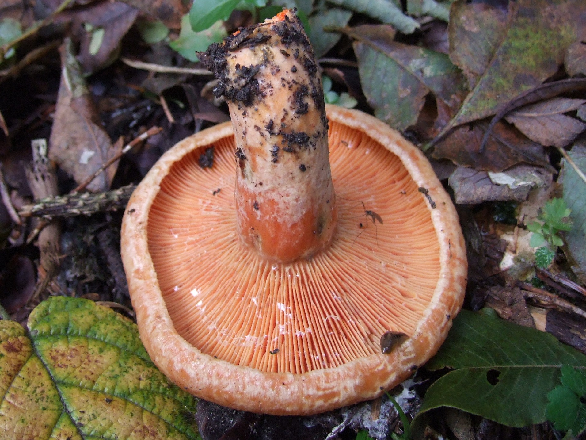 Lactarius deterrimus